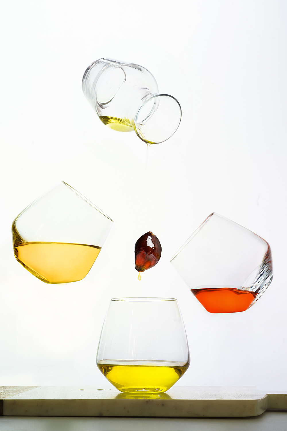 Цвет сырого пальмового масла колеблется от жёлтого до ярко-оранжевого